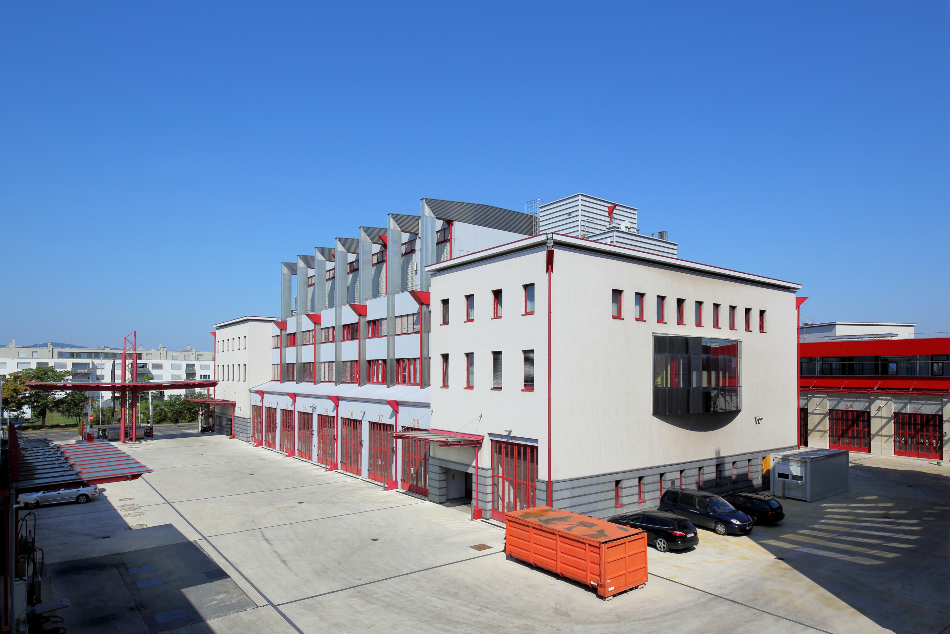 Das Hauptgebäude der Hauptfeuerwache der Brandschutzsektion VII an der Adresse Josef-Brazdovics-Straße 4 im 21. Wiener Gemeindebezirk Floridsdorf.Die Hauptfeuerwache wurde in den Jahren 1993 bis 1996 nach Plänen des Architekten Eduard Neversal auf einer Fläche von rund 14.000 Quadratmeter errichtet.